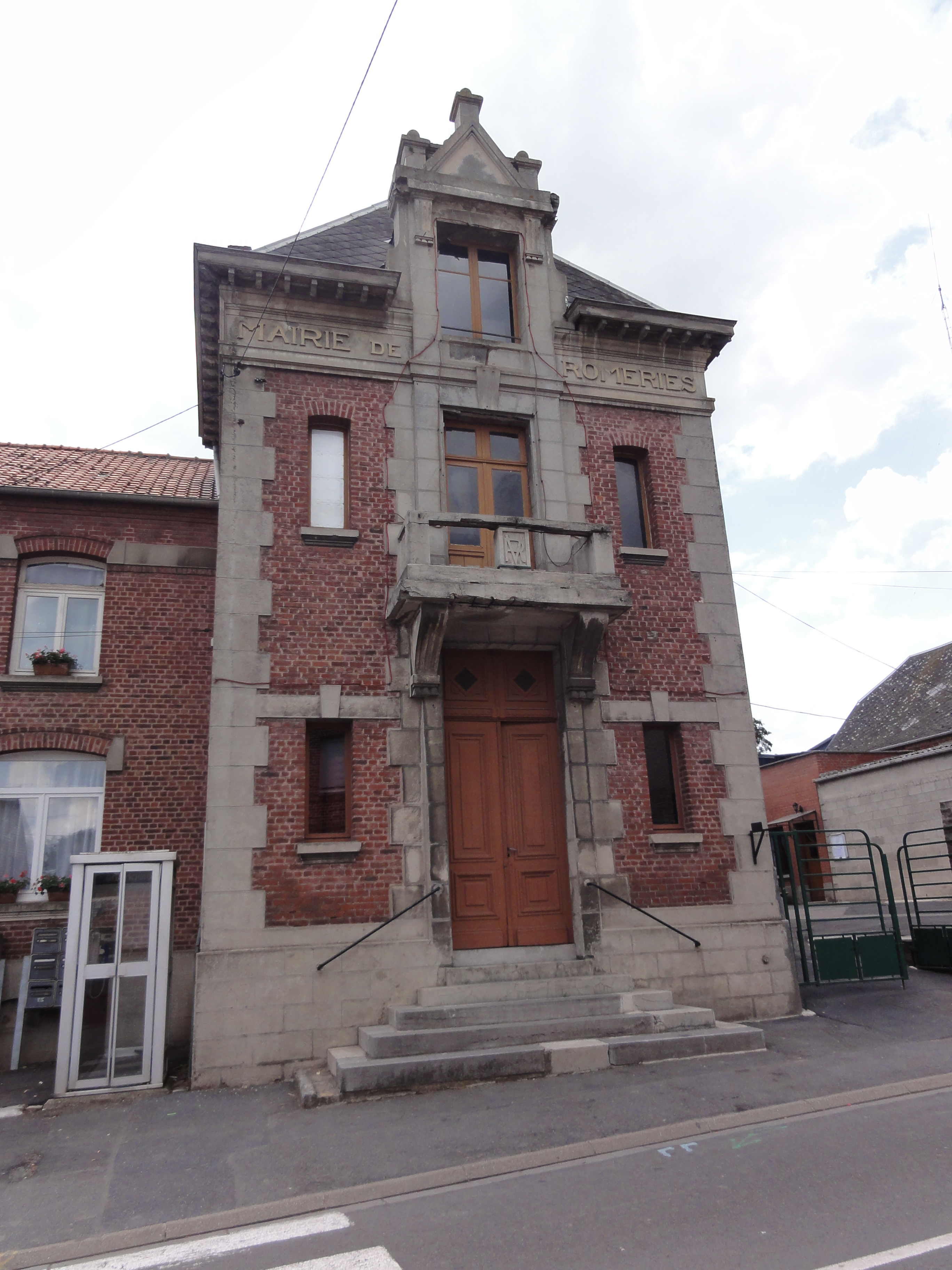 Romeries (Nord, Fr) mairie